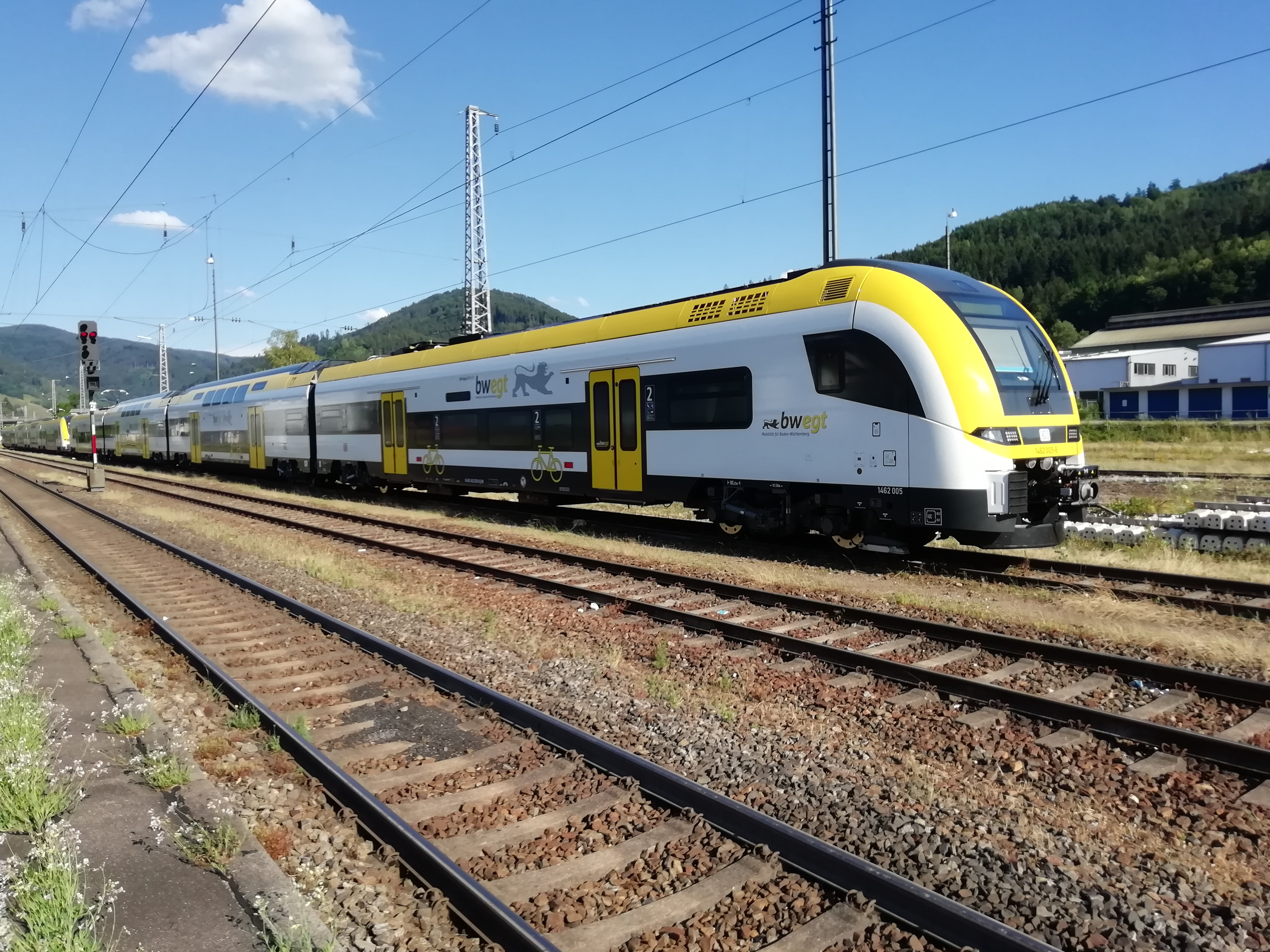 Zwei neue Siemens Desiro HC im bwegt Landesdesign. Die Züge stehen und dem Abstellgleis des Bahnhofs Hausach. Die Züge warten hier auf die Einsetzung auf der Rheintalbahn.